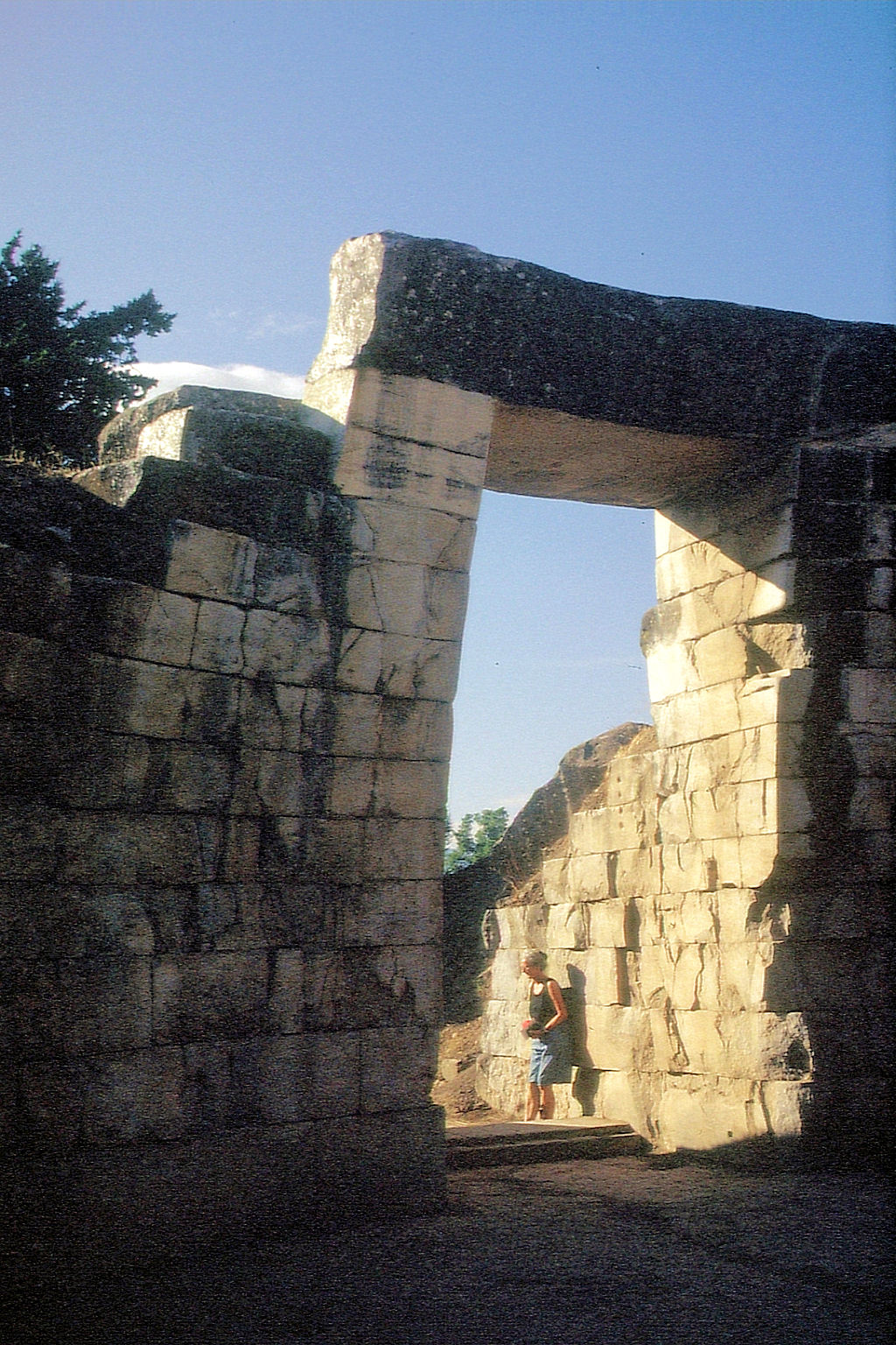 Eingangportal des eingestürzten Kuppelgrabes des Minyas